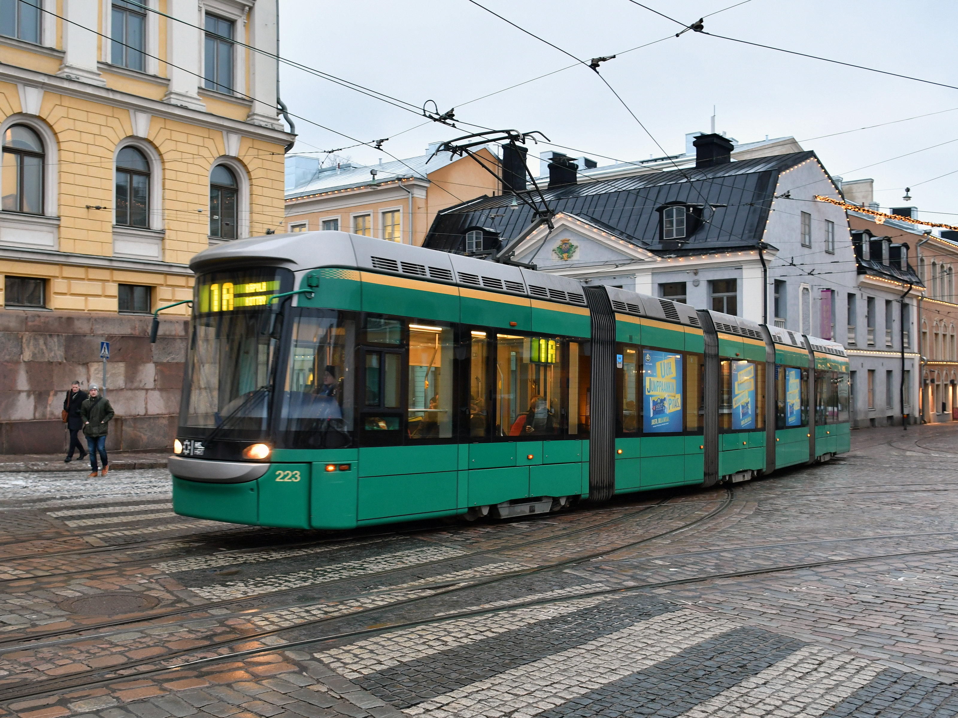 赫尔辛基电车 (Car #223)